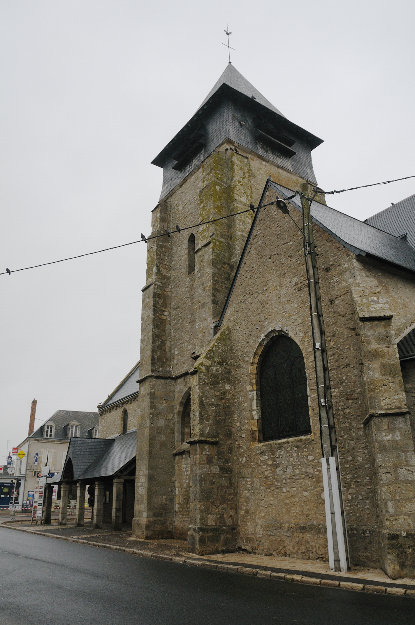 Église Saint-Pierre, Traînou, Loiret, France